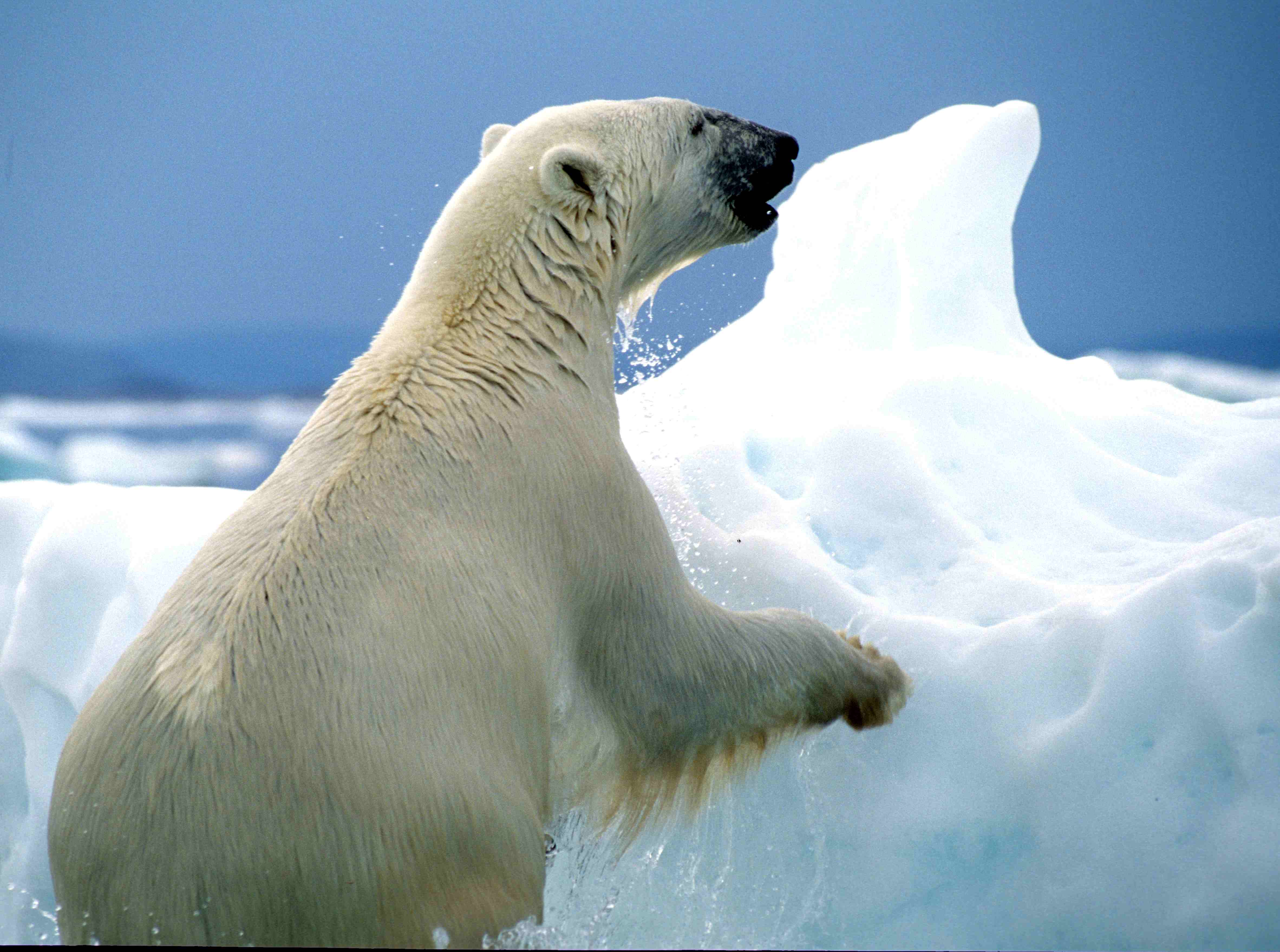 Polar bear, Ursus maritimus; climbing on ice flow (Ukkusiksalik National Park, Nunavut, Canada)